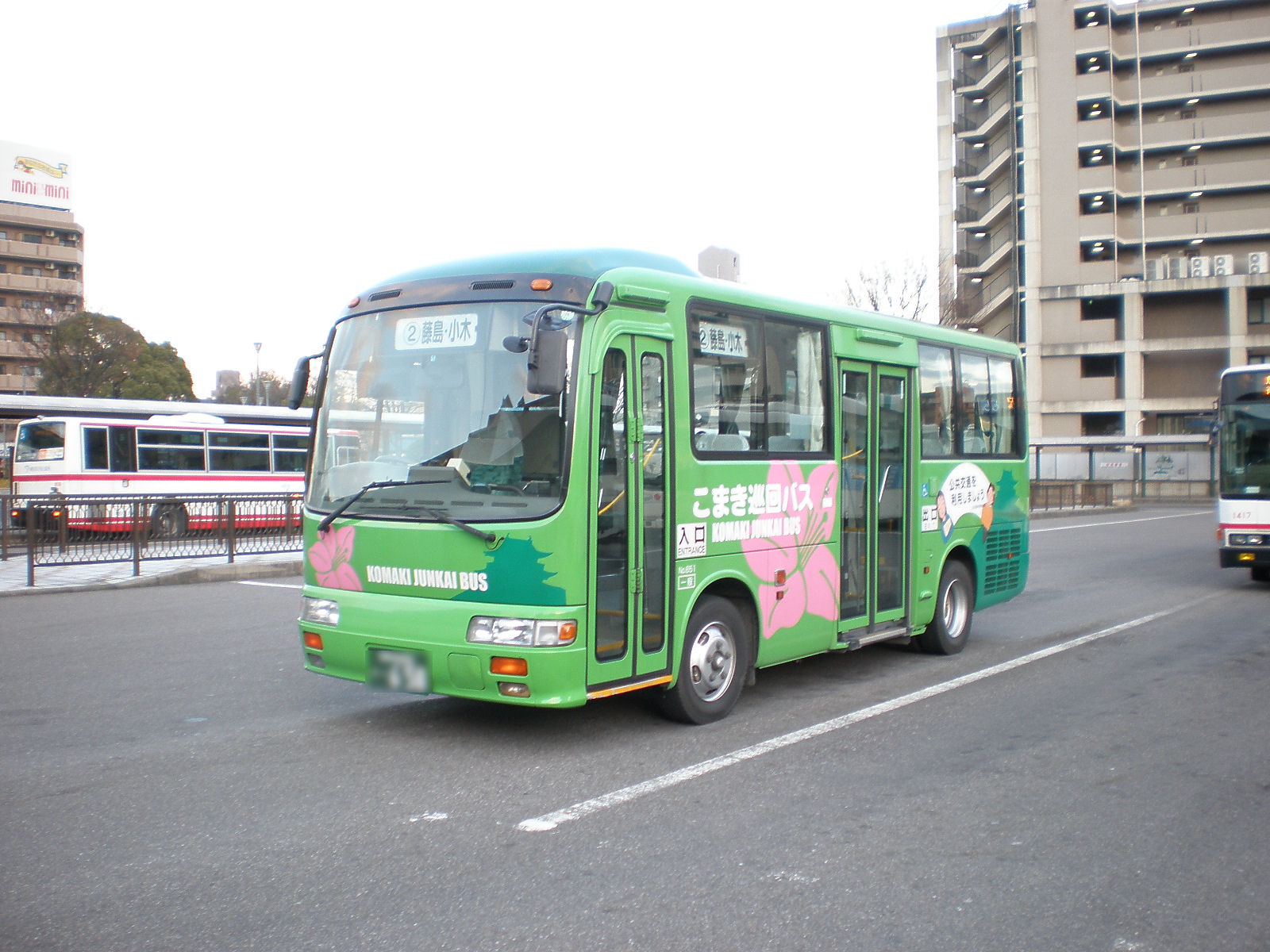 愛知県小牧市で運行されているコミュニティバス・こまき巡回バス（ソフトウェアにて一部修正）